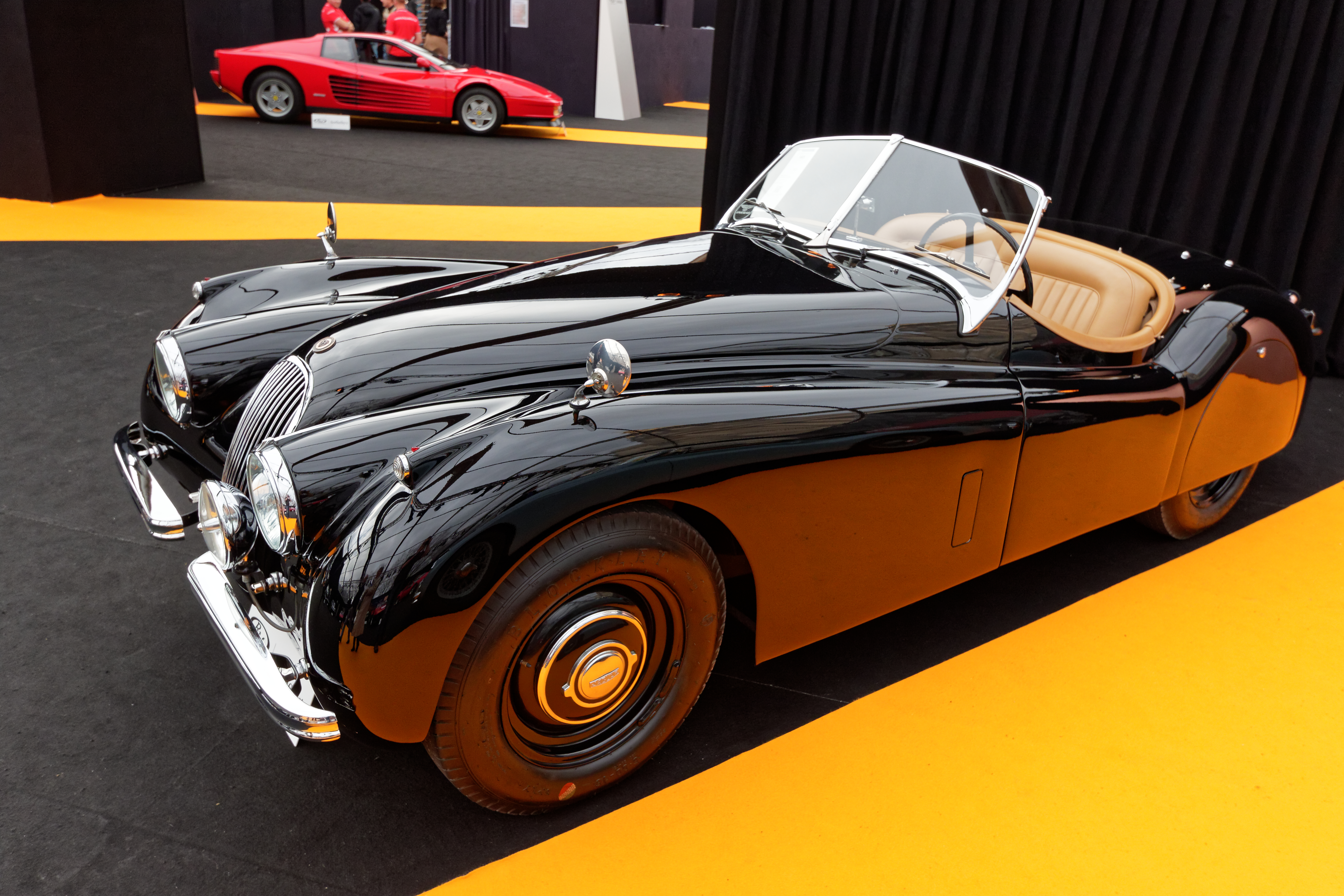 Une Jaguar XK 120 Roadster de 1954 exposée lors de la vente RM Sotheby’s 2016 aux Invalides à Paris.